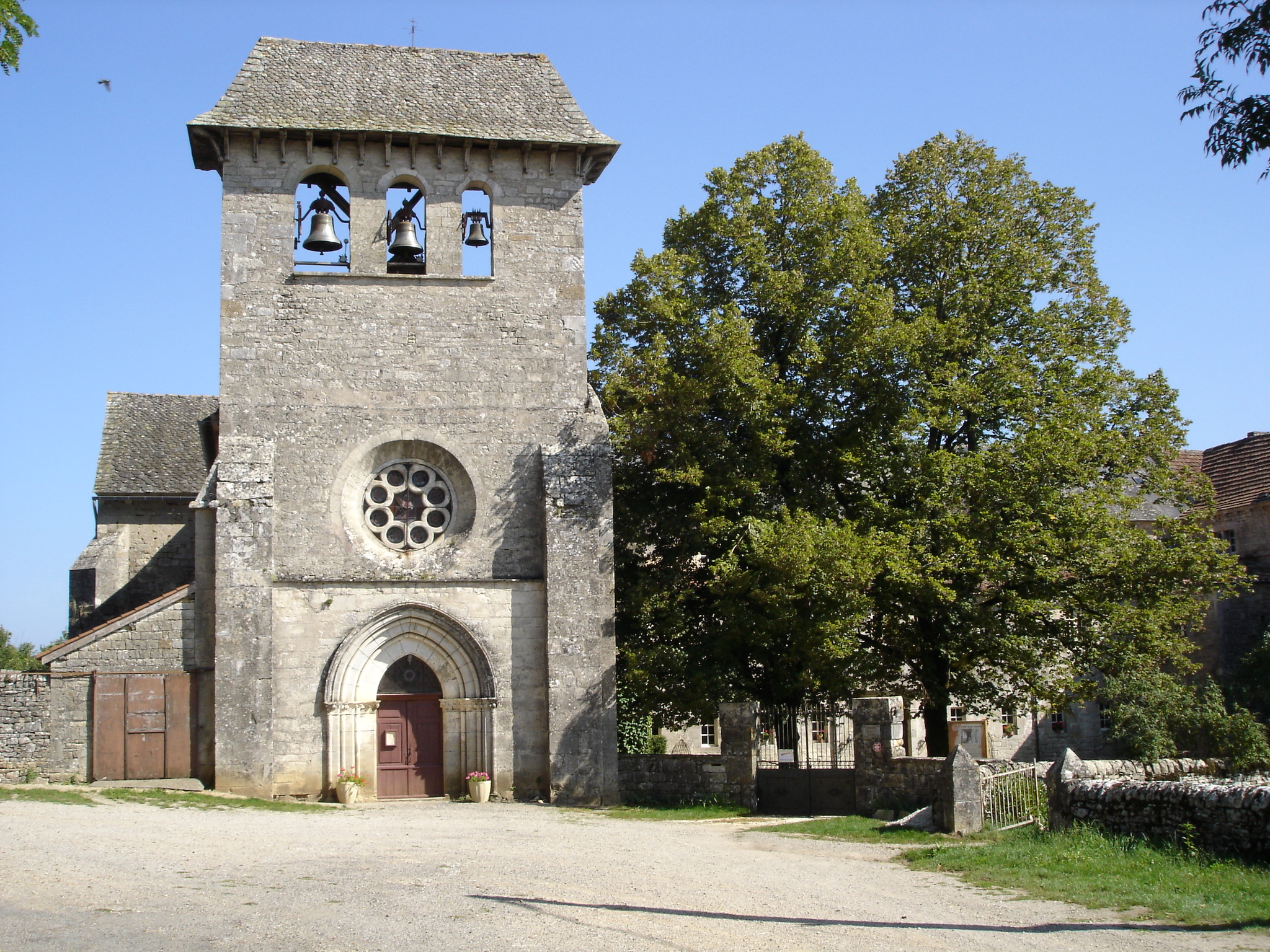 L'église de Laramière (Lot) -- Photo amateur prise par moi-même